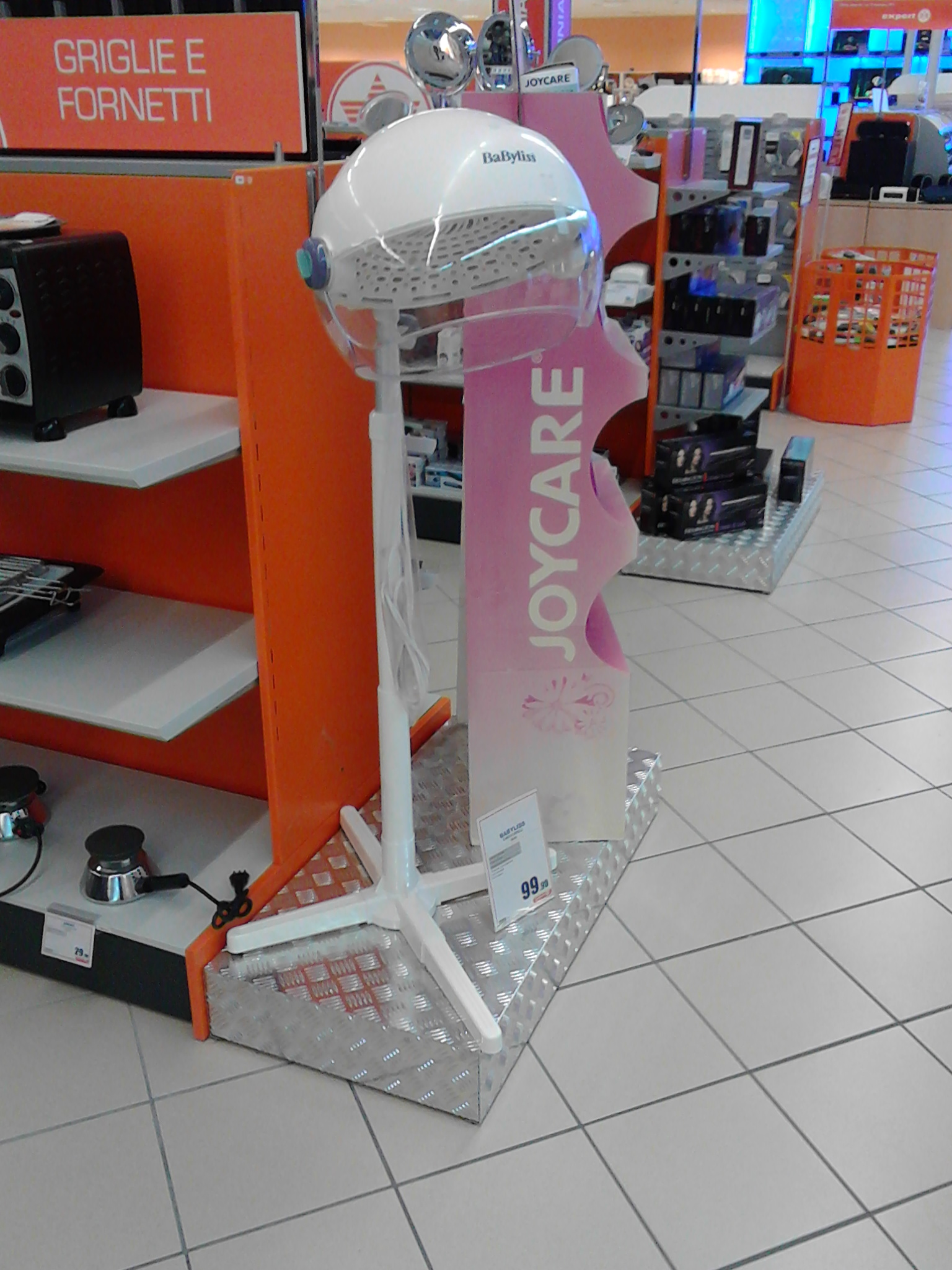 Casco asciugacapelli BaByliss in esposizione